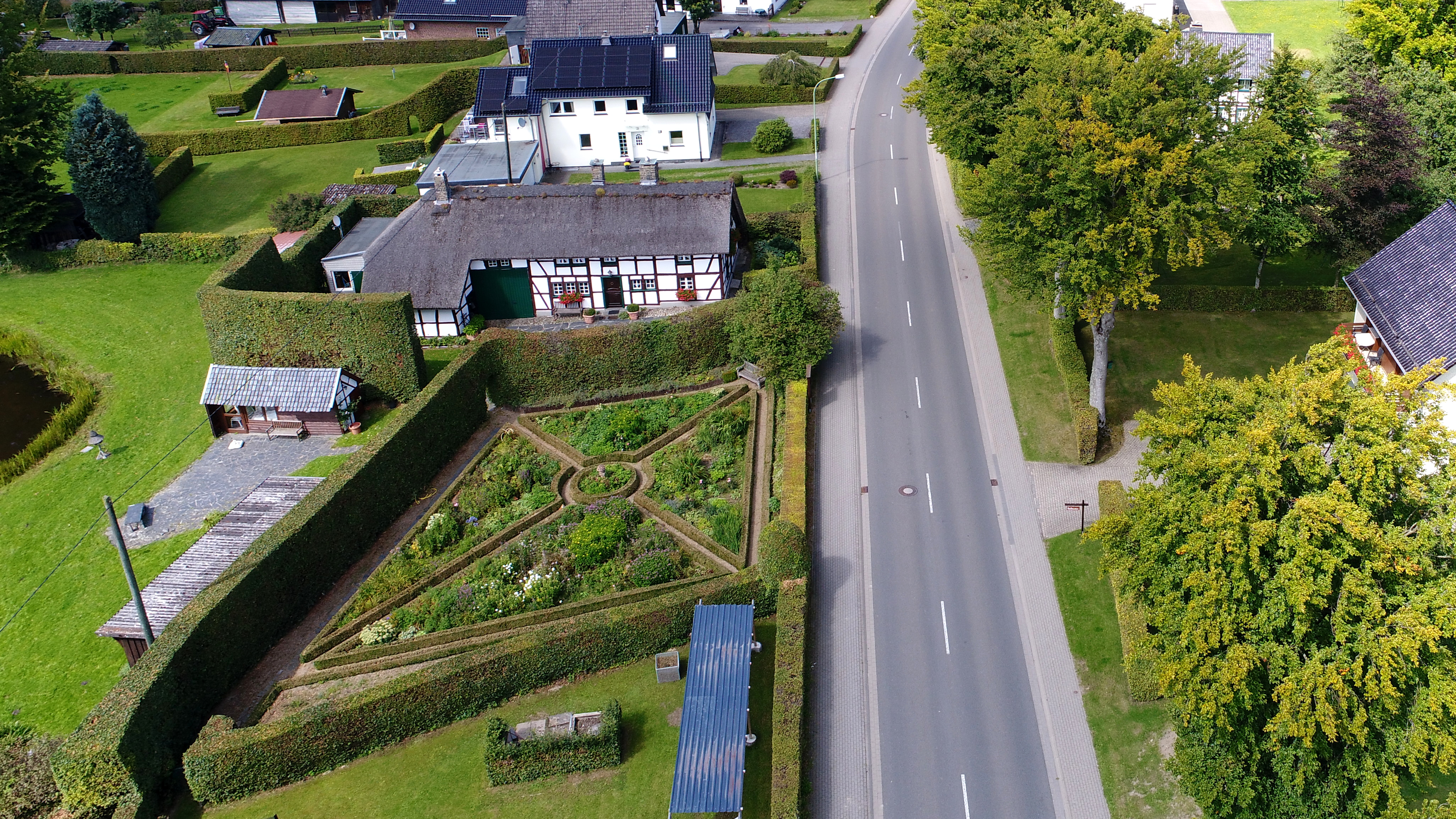 Höfen (Monschau), Hauptstr. 114, Luftaufnahme (2017)